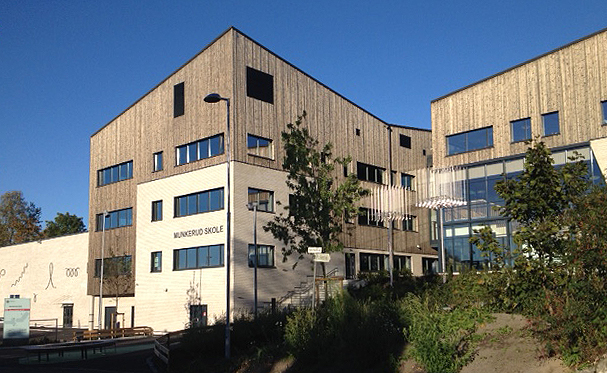 Munkerud skole i Oslo, nytt bygg 2016